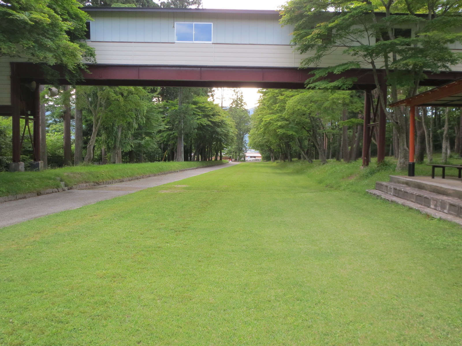 遠野郷八幡宮にある馬場